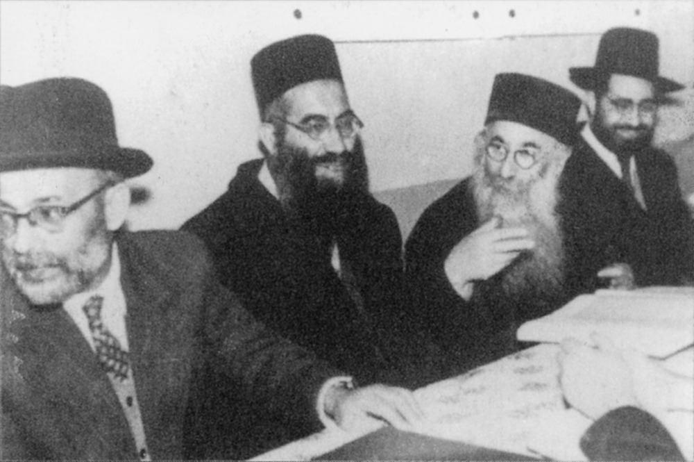 עובדיה יוסף, יעקב עדס, מנצור בן שמעון ויהודה צדקה.